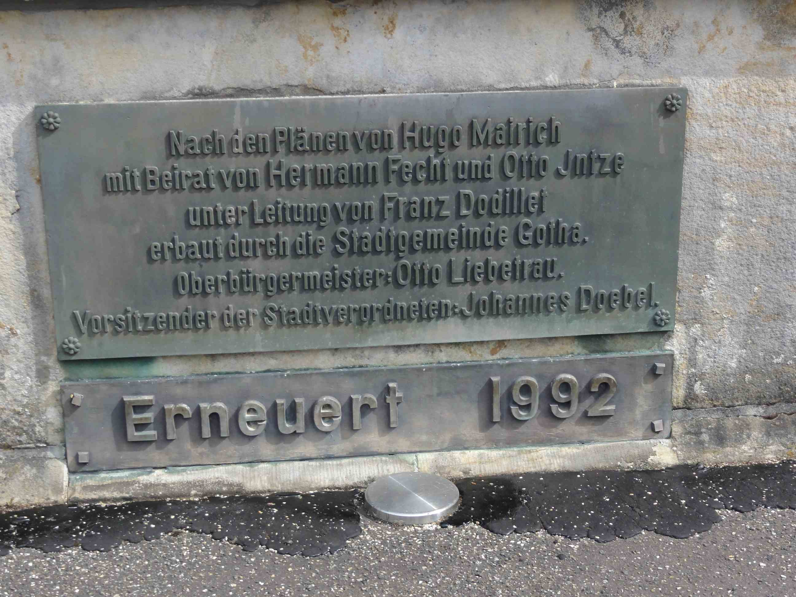 Johannes Doebel hat bei der Forderung und Genehmigung der alten Tambacher Talsperre mitgewirkt